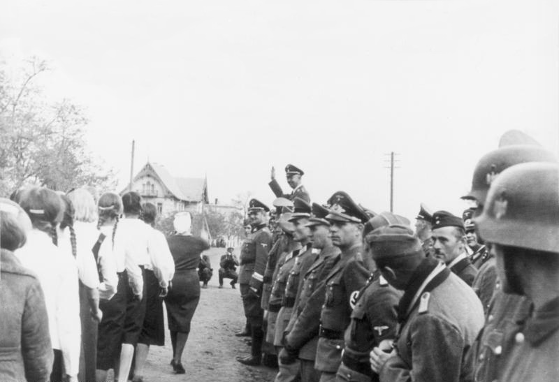 Vorbeimarsch der Volksdeutschen Jugend vor Himmler in Halbstadt / Molotschna, 31.10.1942